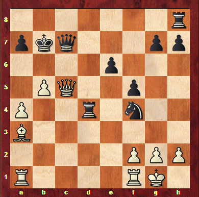 El mate Anastasia se caracteriza por la combinación del caballo que cierra los escapes y el ultimo movimiento de una torre o dama que ataca en columna.